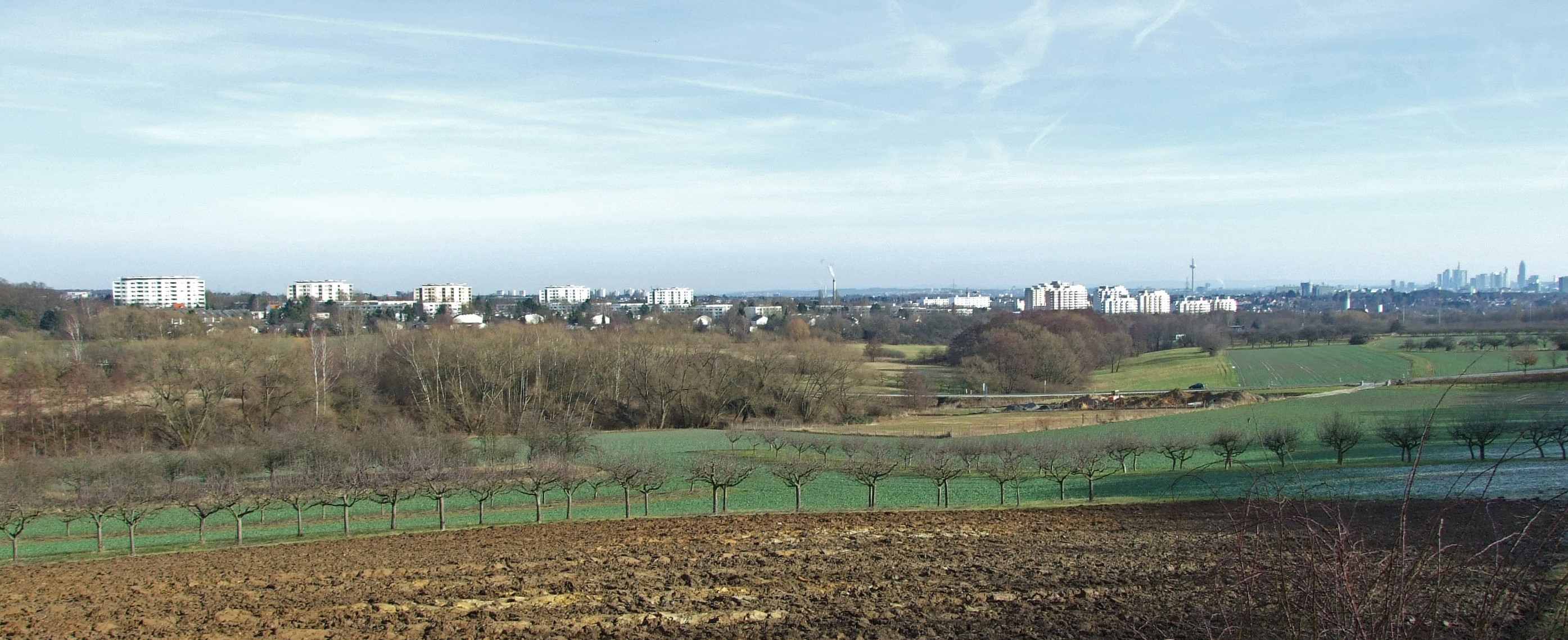 Schwalbach-Limesstadt vor Frankfurter Kulisse